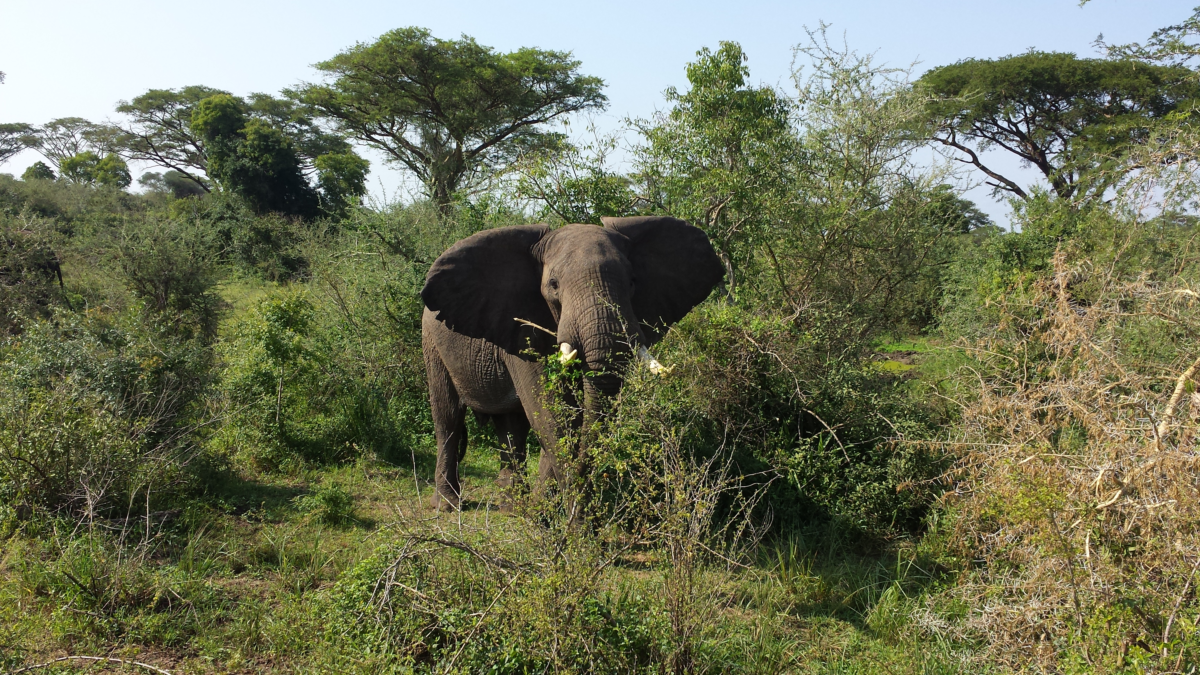 פיל בשמורת המלכה אליזבת